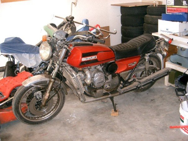 1975 Suzuki RE5.